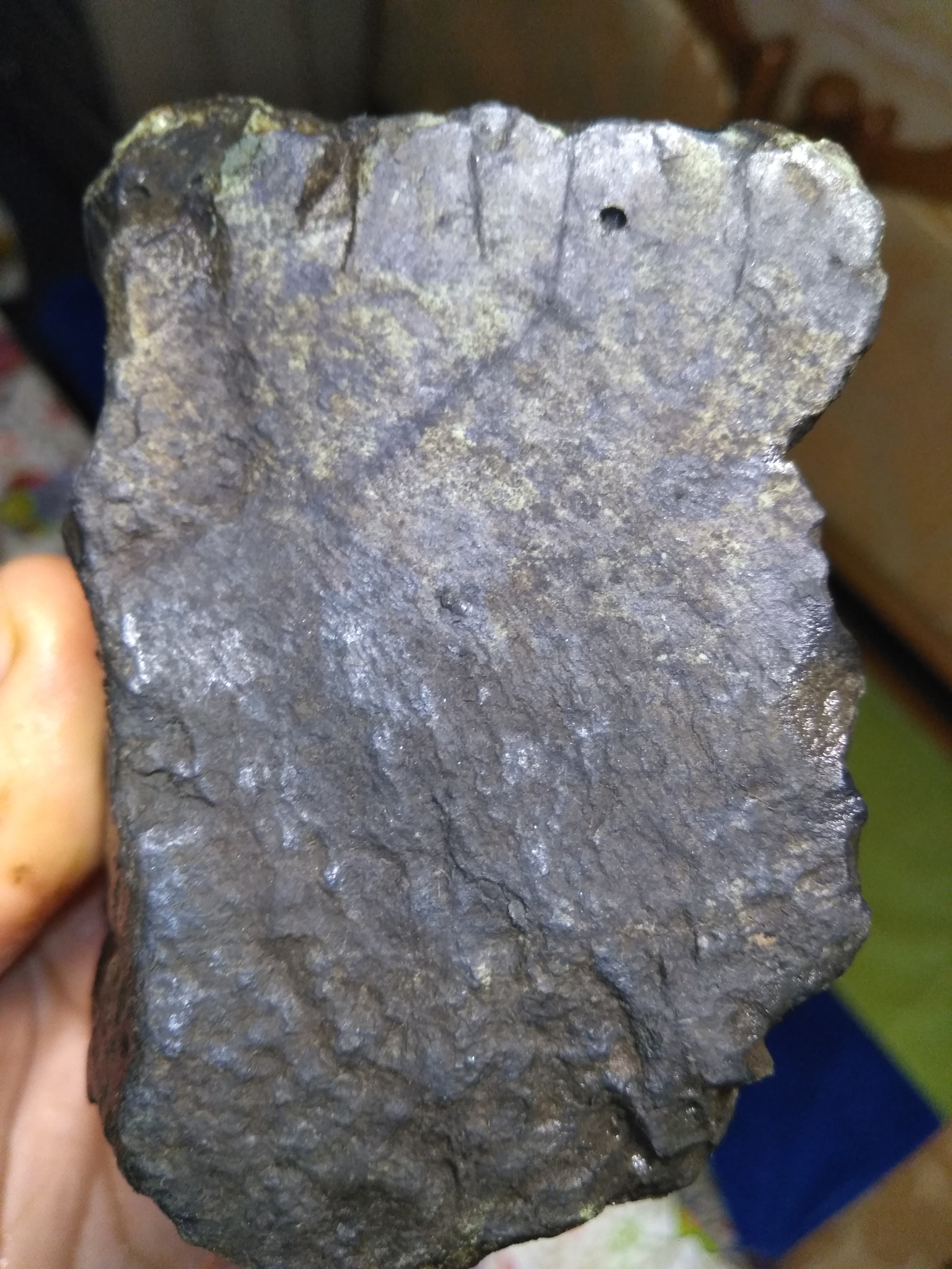 Це шлак з виробництва марганцевих феросплавів Нікопольського заводу феросплавів